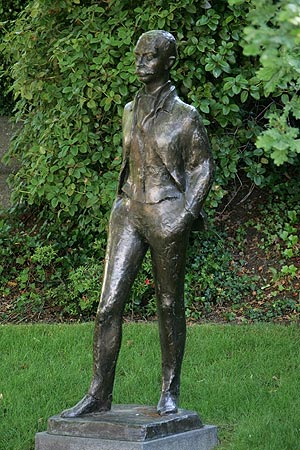 Lausanne: Le Parc Olympique (Pierre de Coubertin)